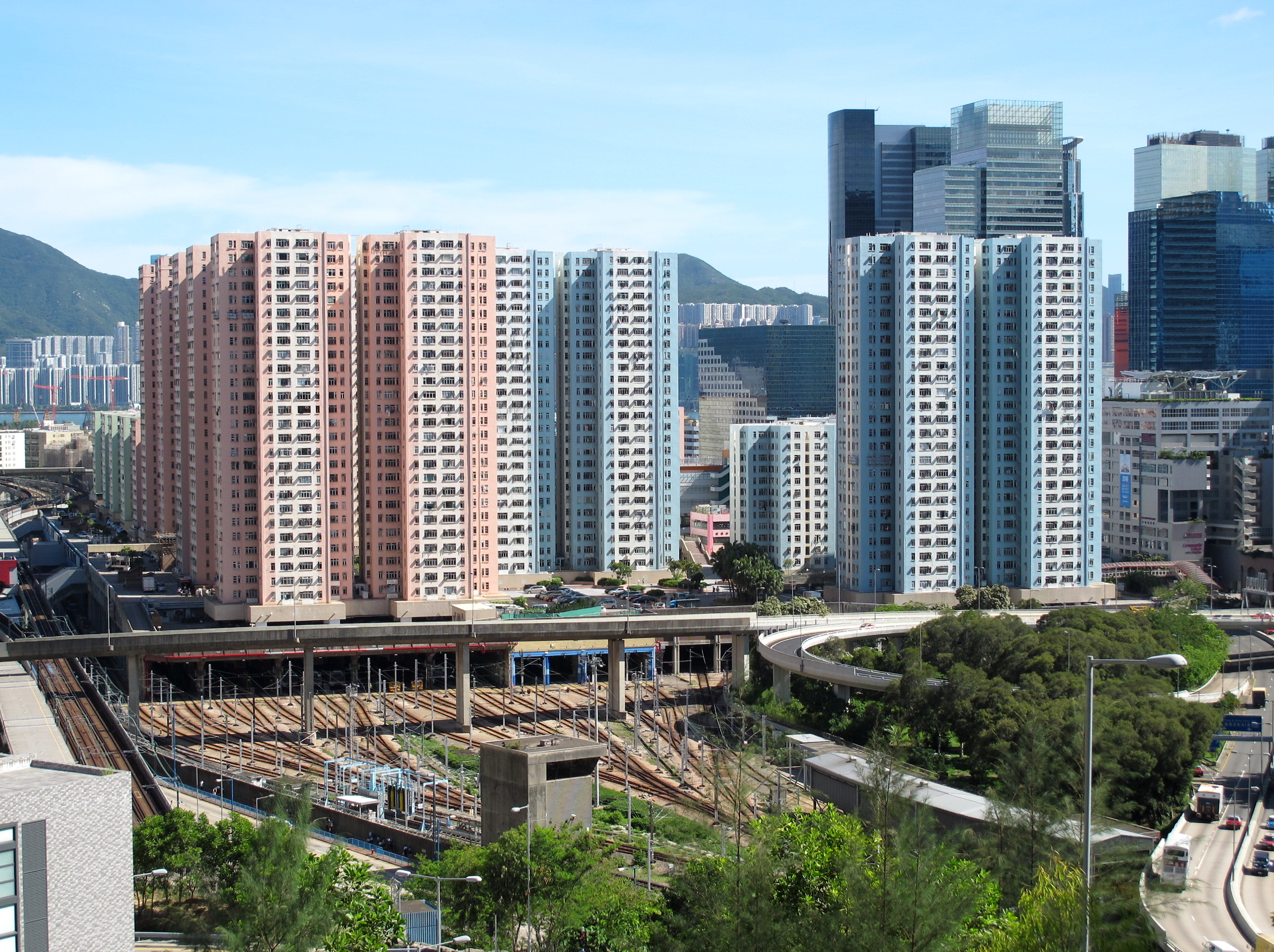 Telford Garden Overview 九龍灣車廠及德福花園